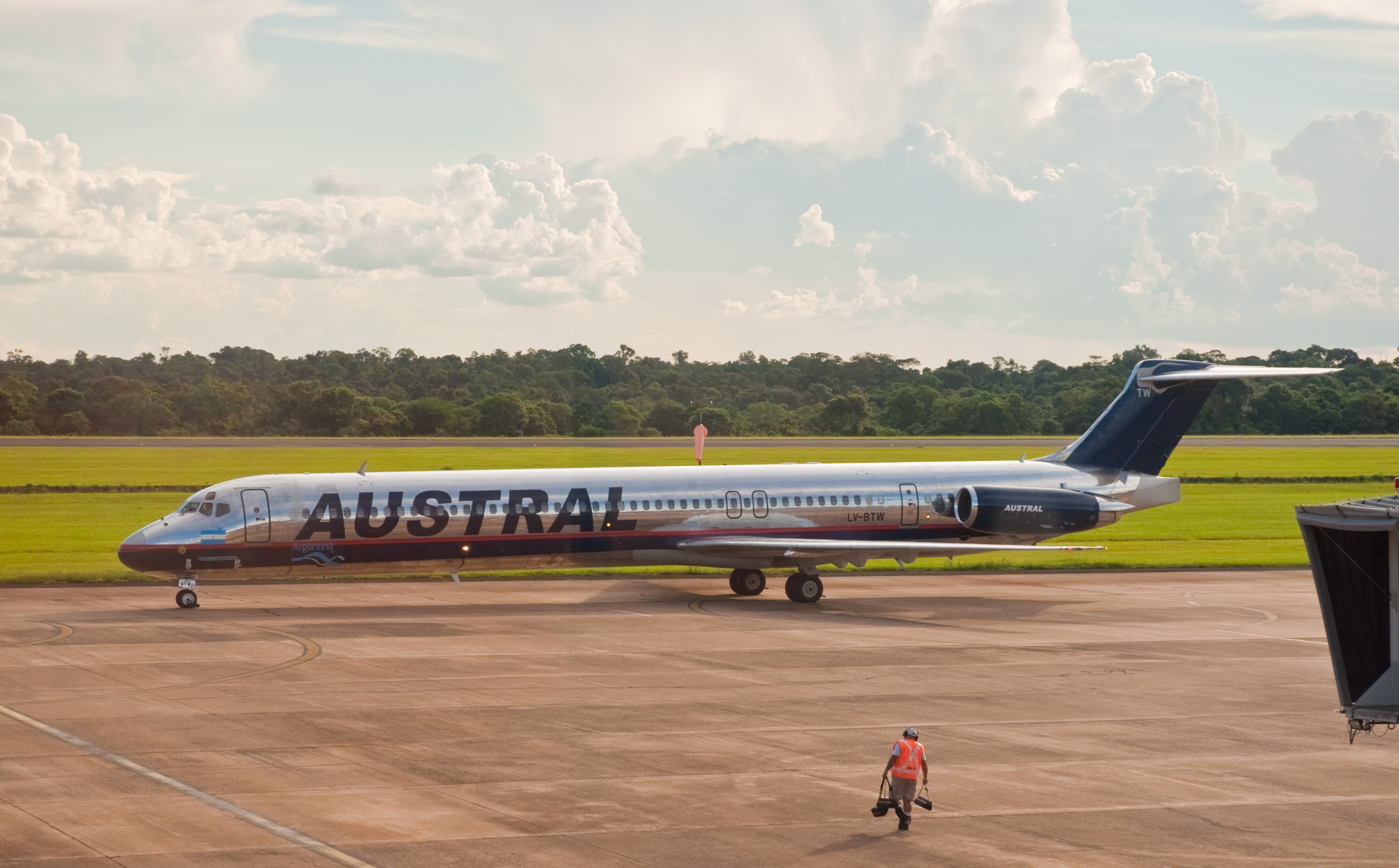 Austral MD80, Puerto Iguazu, Misiones, Jan. 2011